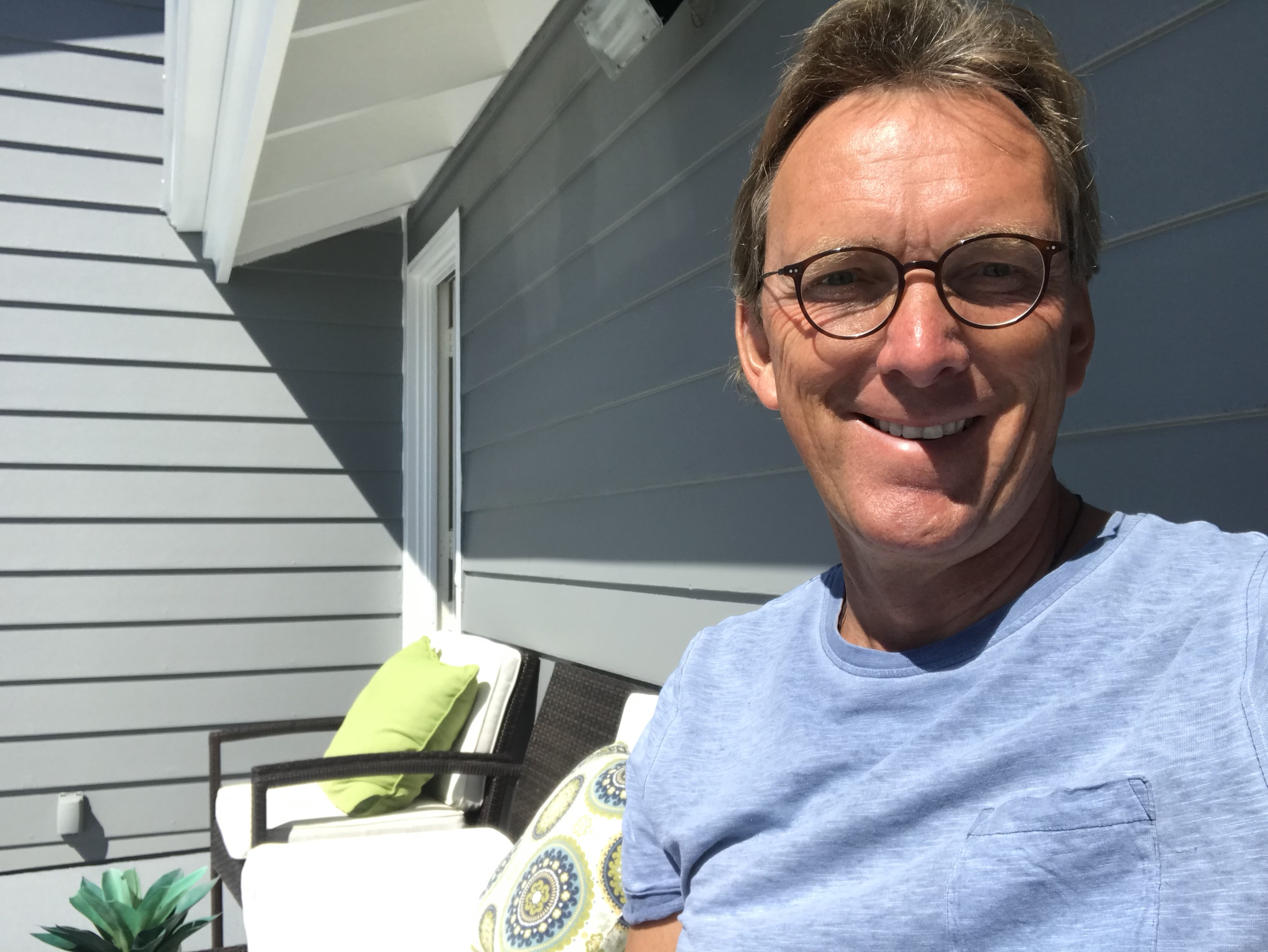 Tielking-Profil